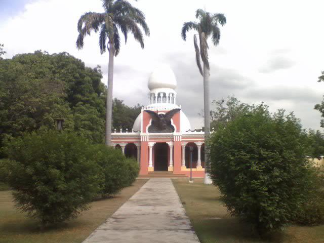 Mausoleo de Juan Vicente Gómez